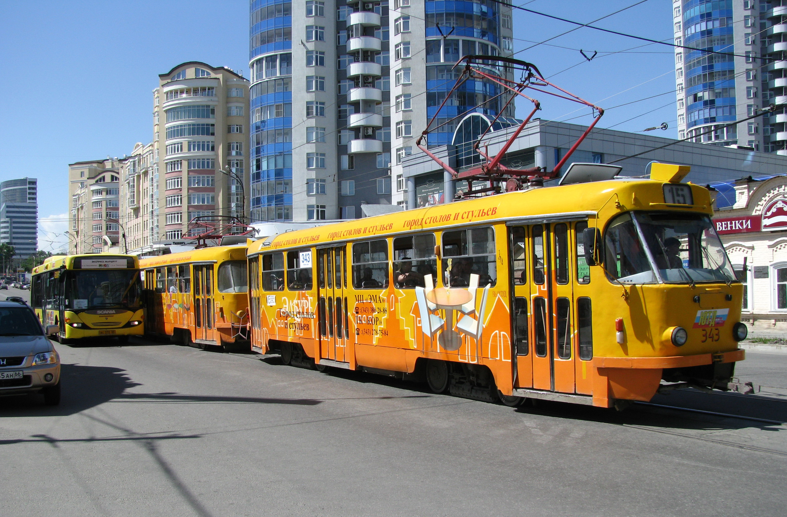 Трамвай Tatra и Автобус Scania(ст.метро «Геологическая» — ТРЦ «Мега») на ул. Радищева в Екатеринбурге.